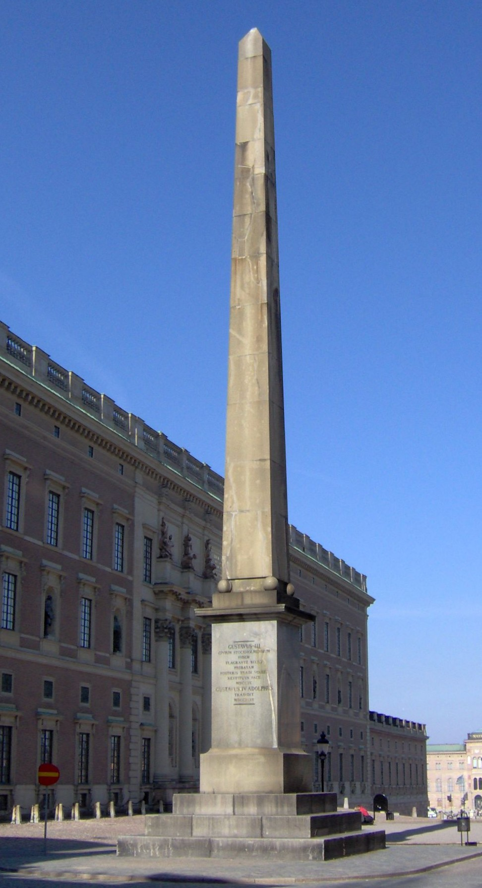 Obelisken på Slottsbacken utanför slottet. Räknas som Stockholms mittpunkt.